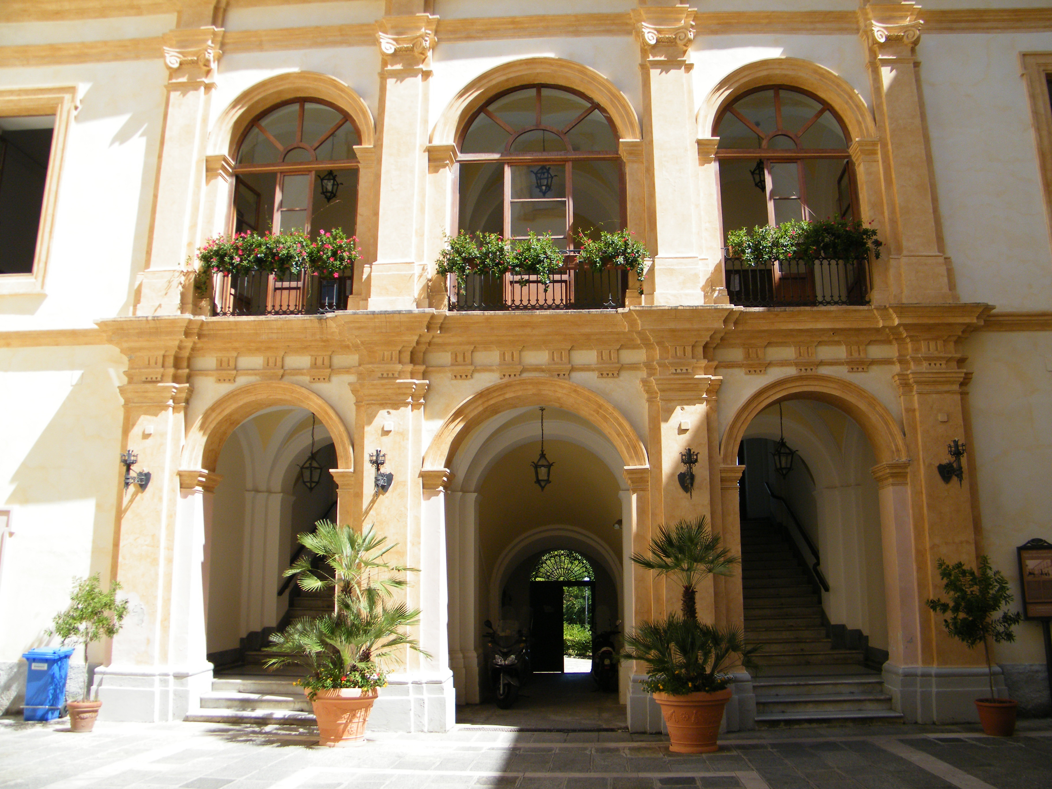 Palazza De Nobili, sede dell'amministrazione comunale. Cortile interno